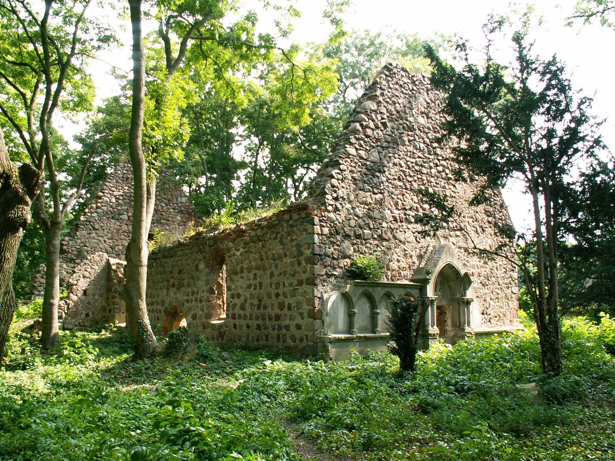 Pargowo - ruina kościoła, pocz. XIV